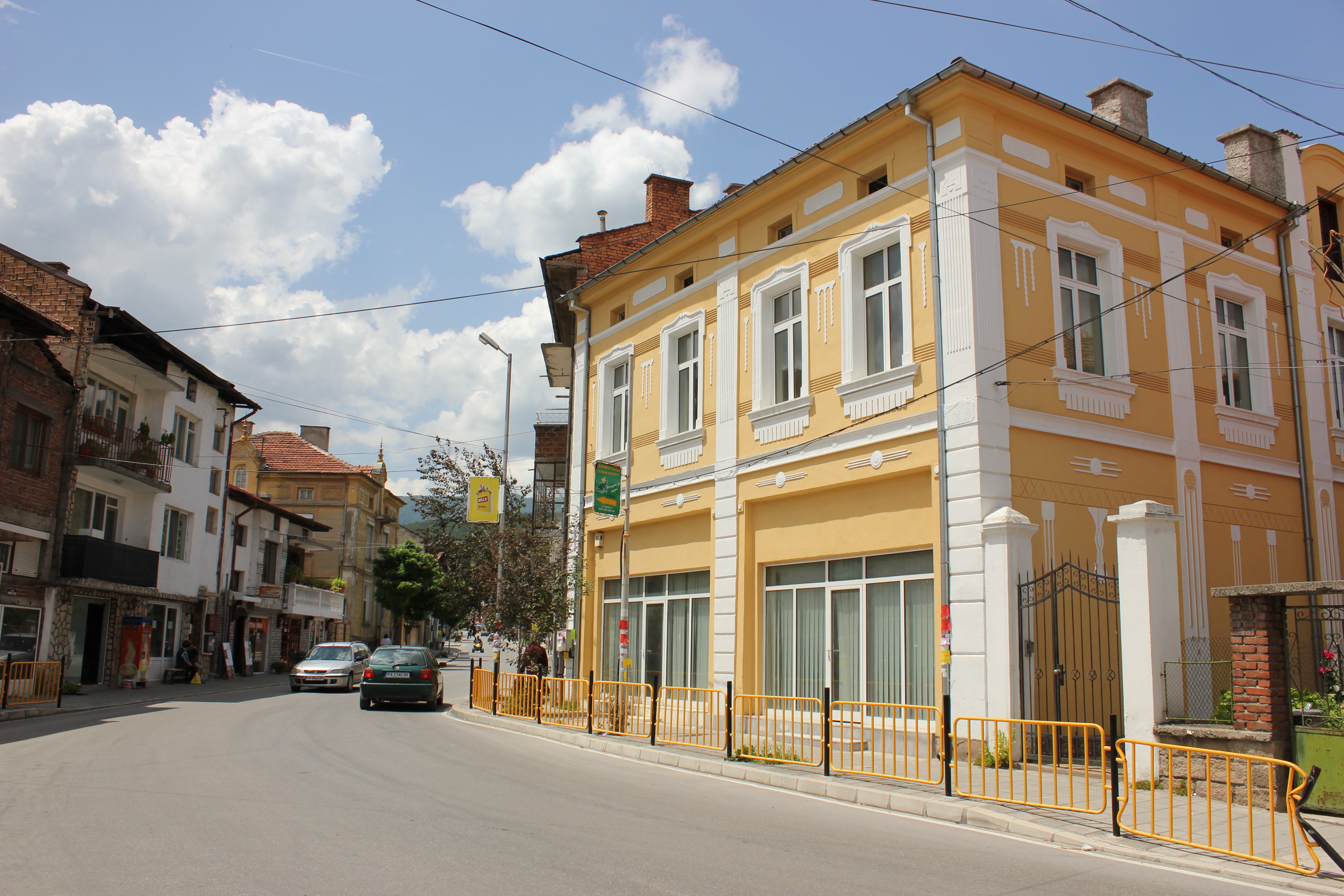 Улица „Михаил Такев" в град Пещера, България.